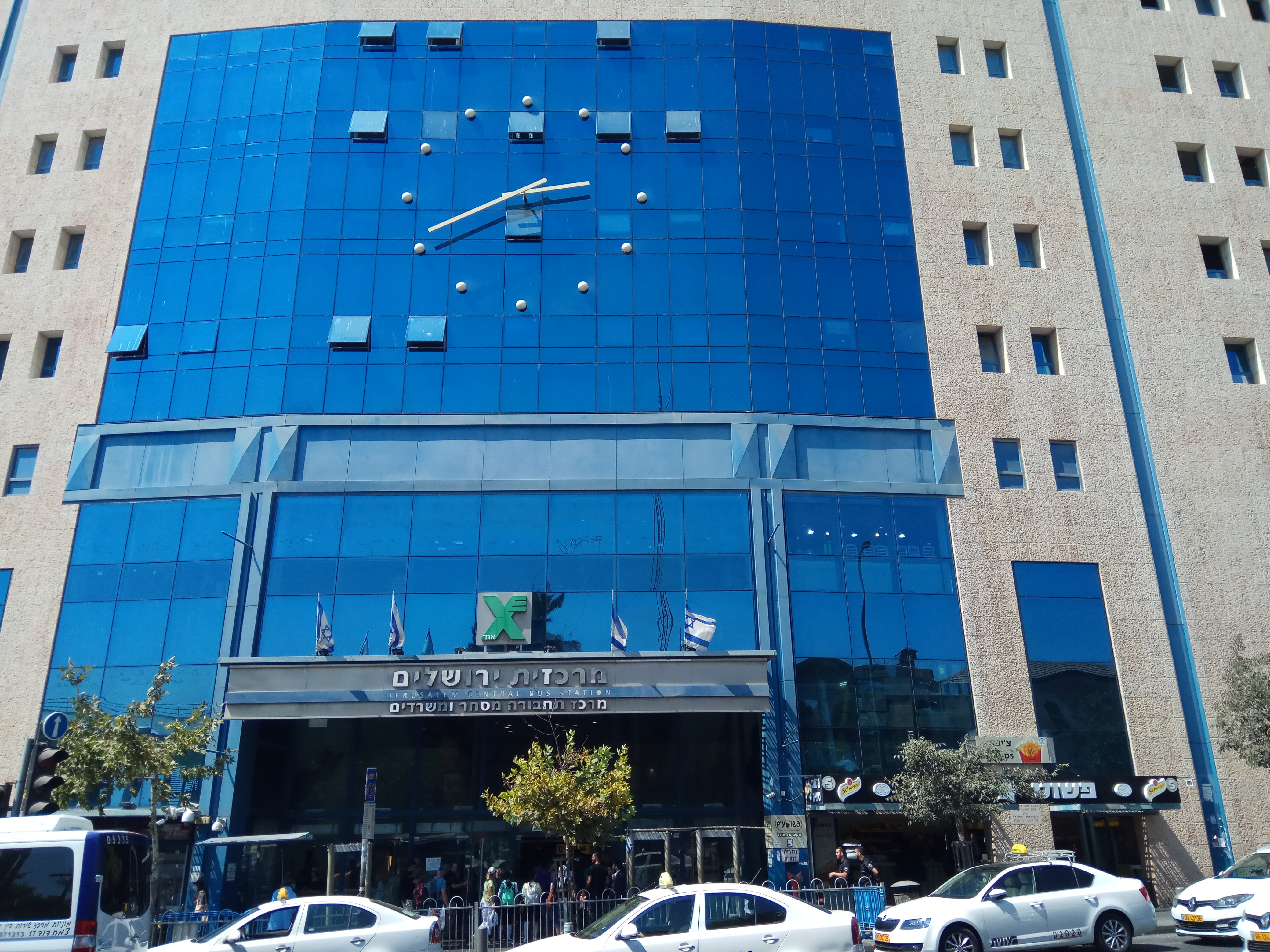 הכניסה הראשית לתחנת האוטובוסים המרכזית בירושלים